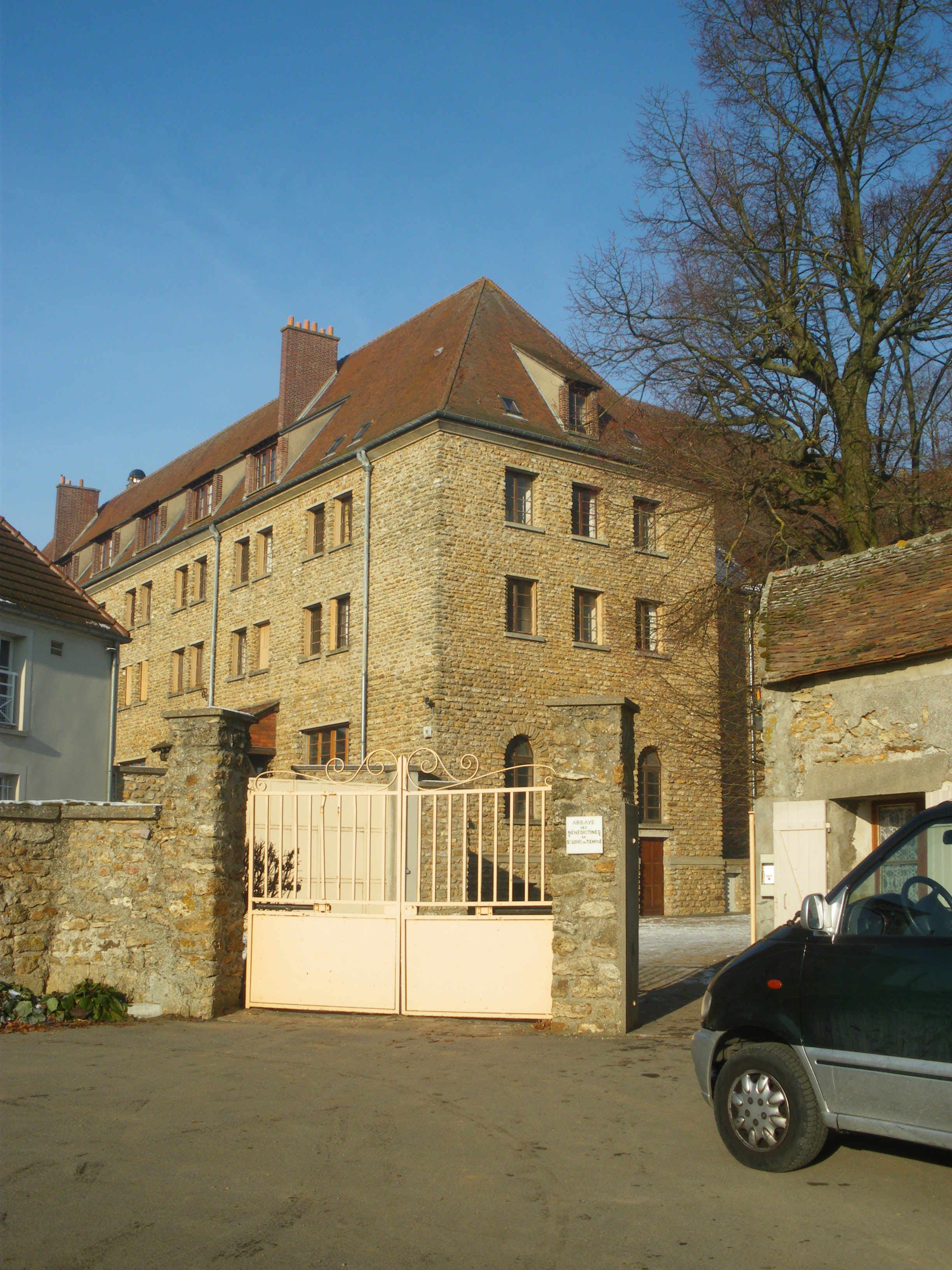 Abbaye des Bénédictines, Vauhallan, Essonne